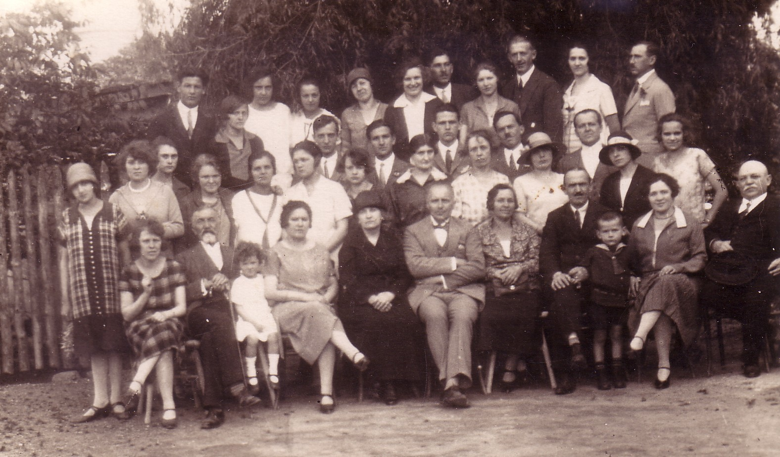 Die Sängerinnen und Sänger des Blumenthaler Kirchenchors